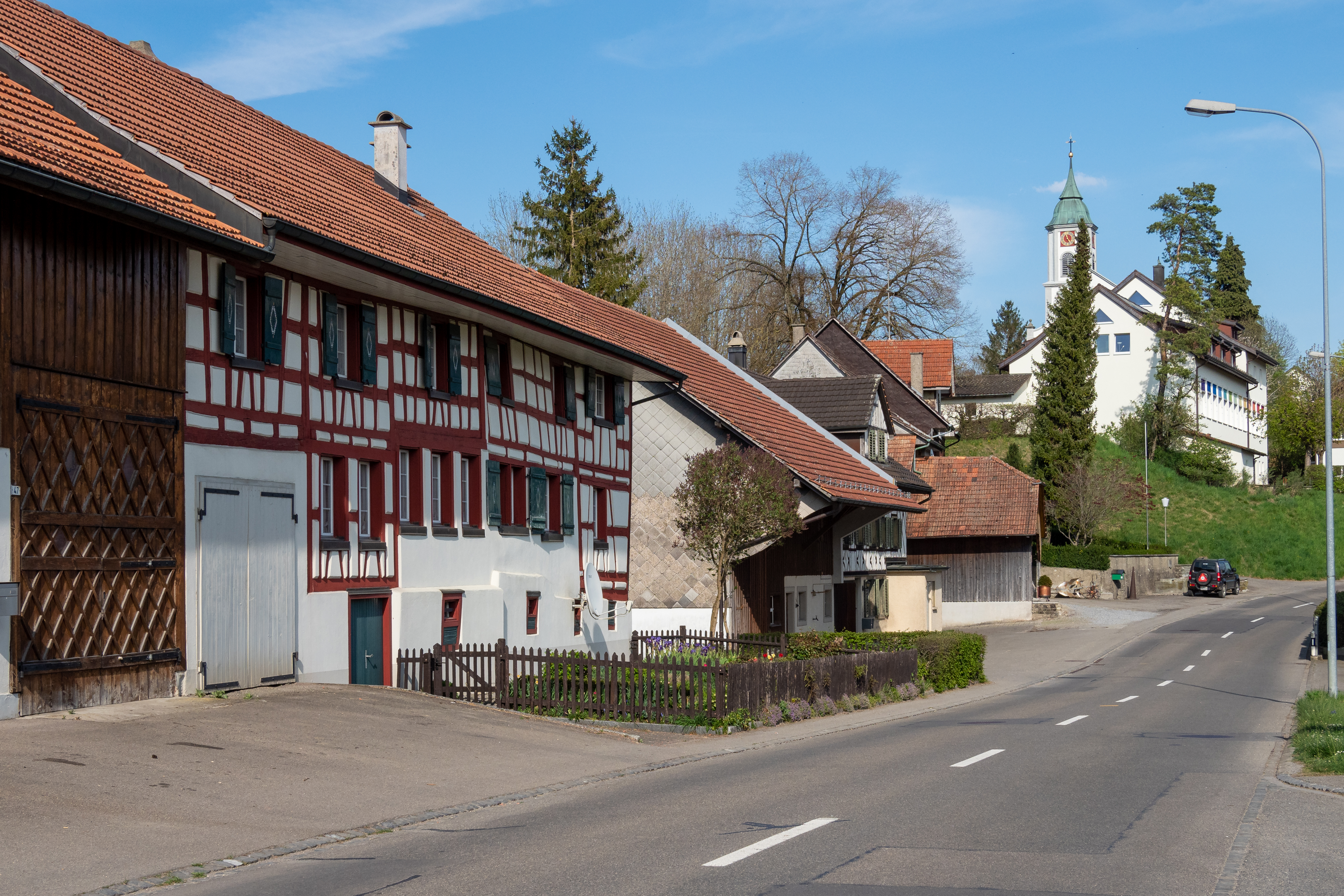 Homburg TG: Hauptstrasse und Kirche. Links vorne: Vielzweckgebäude in der Erscheinung des 19. Jahrhunderts, im Kern älter und von der Denkmalpflege Thurgau als "wertvoll" eingeschätzt.